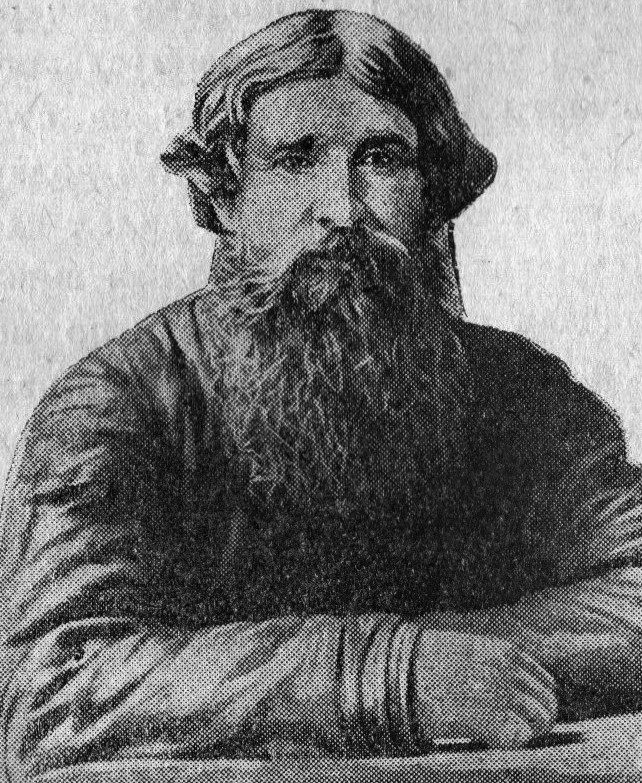 Reproduction d'une photographie publiée A. T. Kniazev